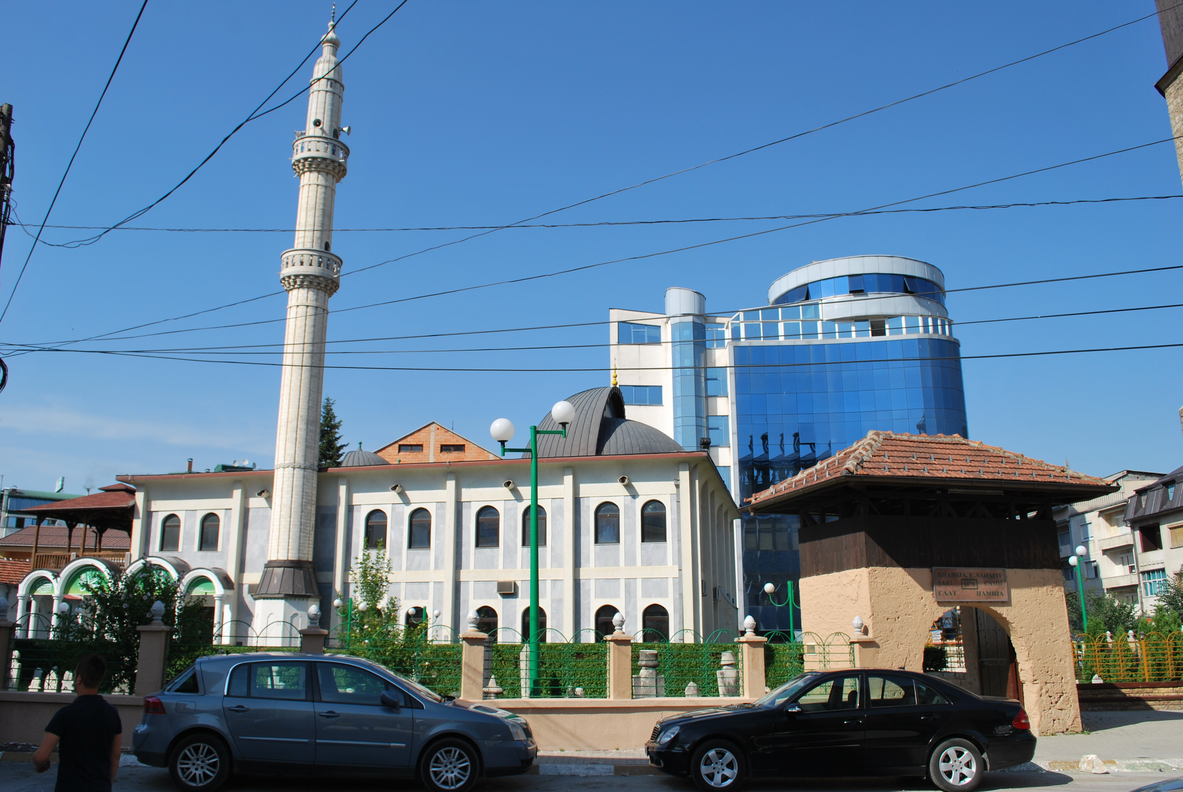 Saat Džamija in Gostivar, Macedonia